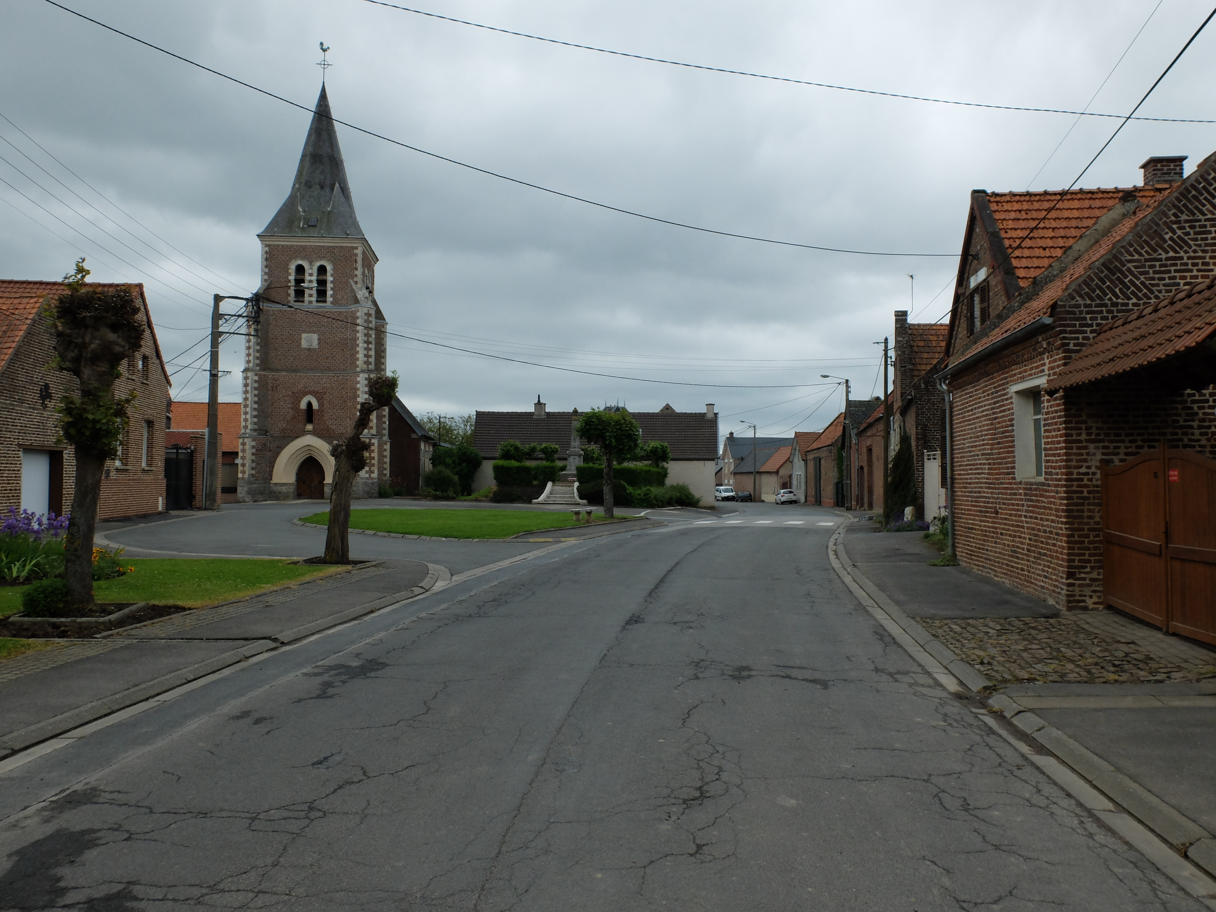 Vue de la mairie de Villers-lès-Cagnicourt. L'église est visible.